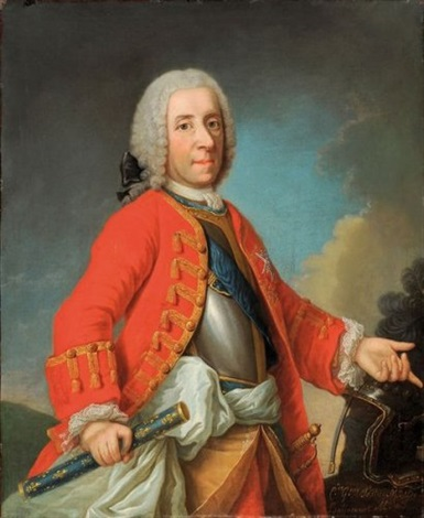 Portrait du Maréchal Claude Guillaume Testud, marquis de Balincourt